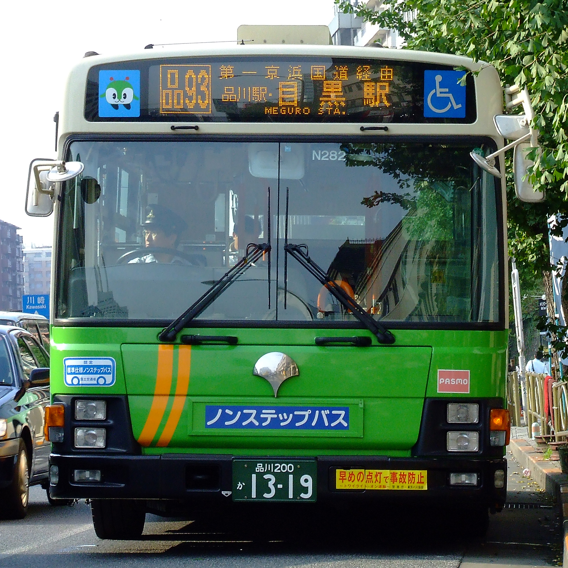 都営バス（東京都交通局）品川自動車営業所港南支所Y-N282号車 品93系統目黒駅行き運用中（朝ラッシュ時に「開かずの踏み切り」回避のために見られる第一京浜国道経由便）